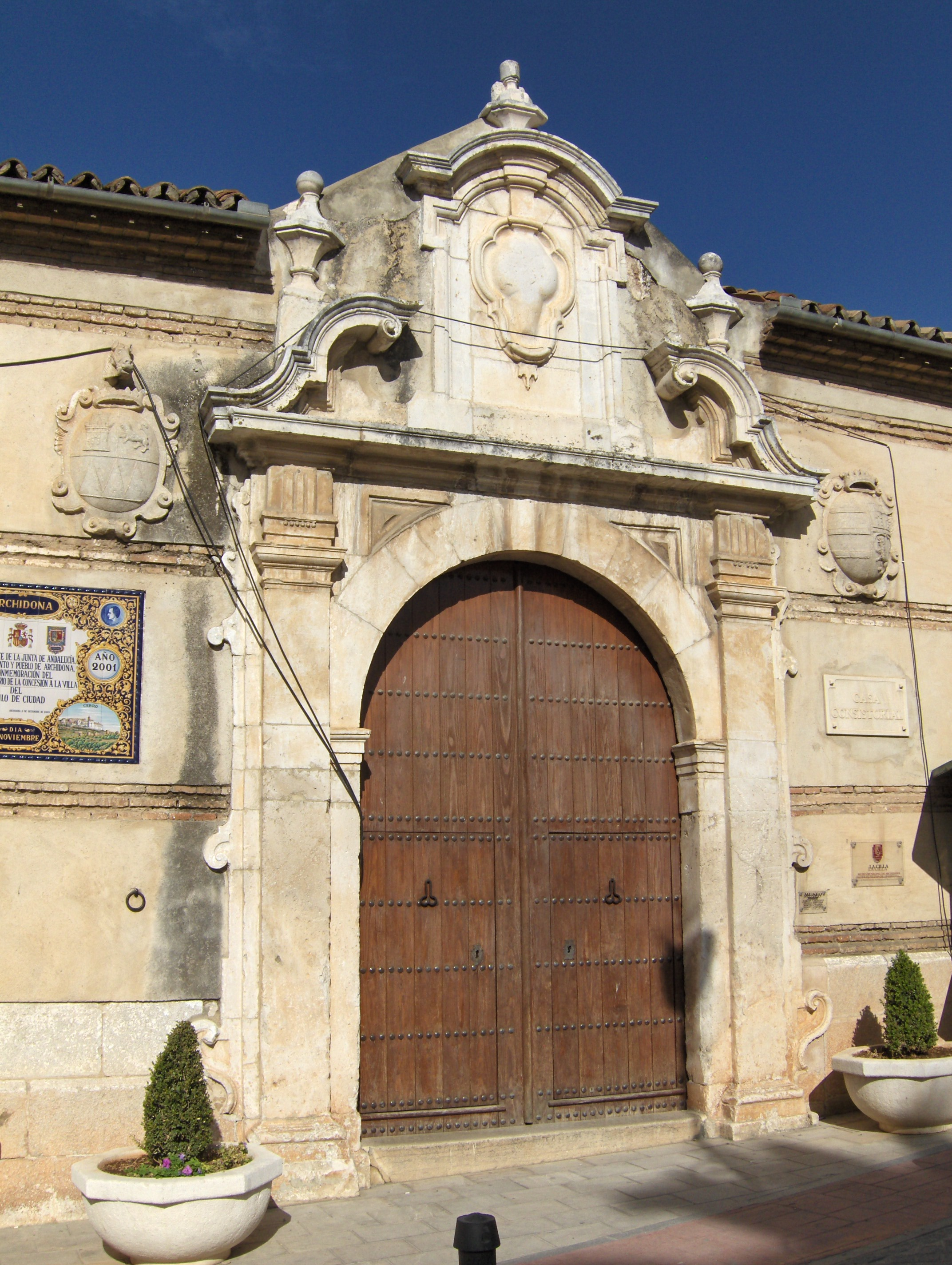 Portada del Edificio de la cilla, antiguo ayuntamiento de Archidona, provincia de Málaga, España.